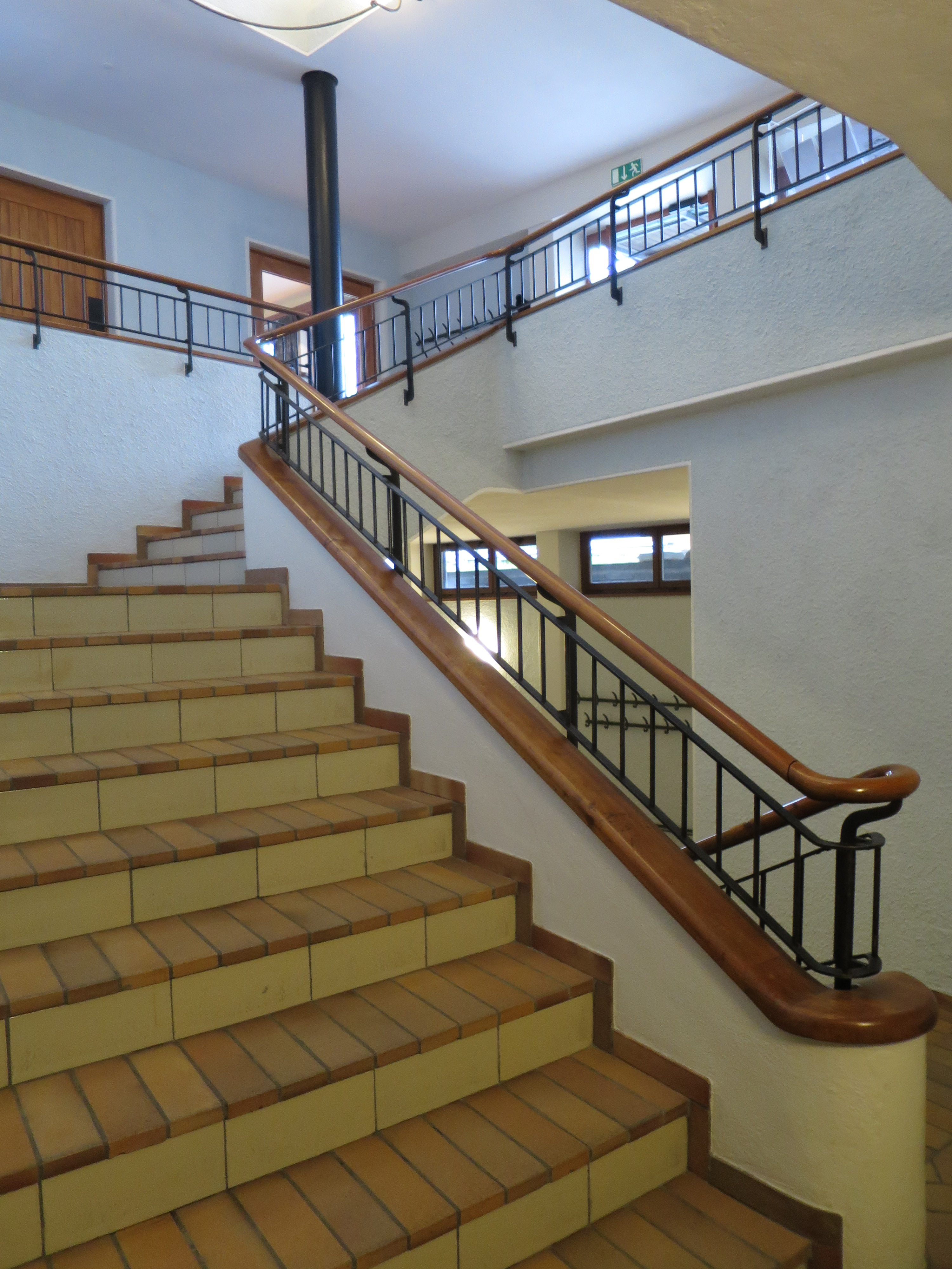 Neue Kirche Altstetten